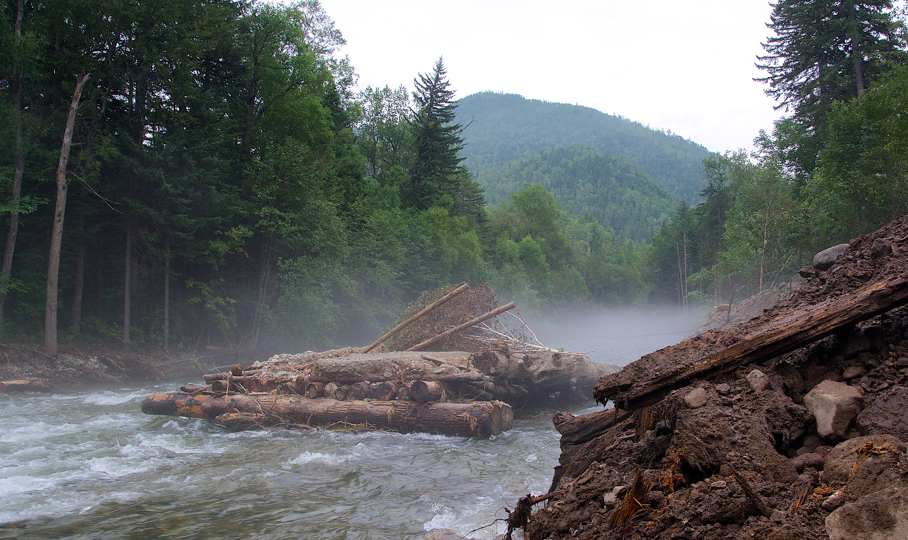 Кема-Амгинский, Красноармейский район